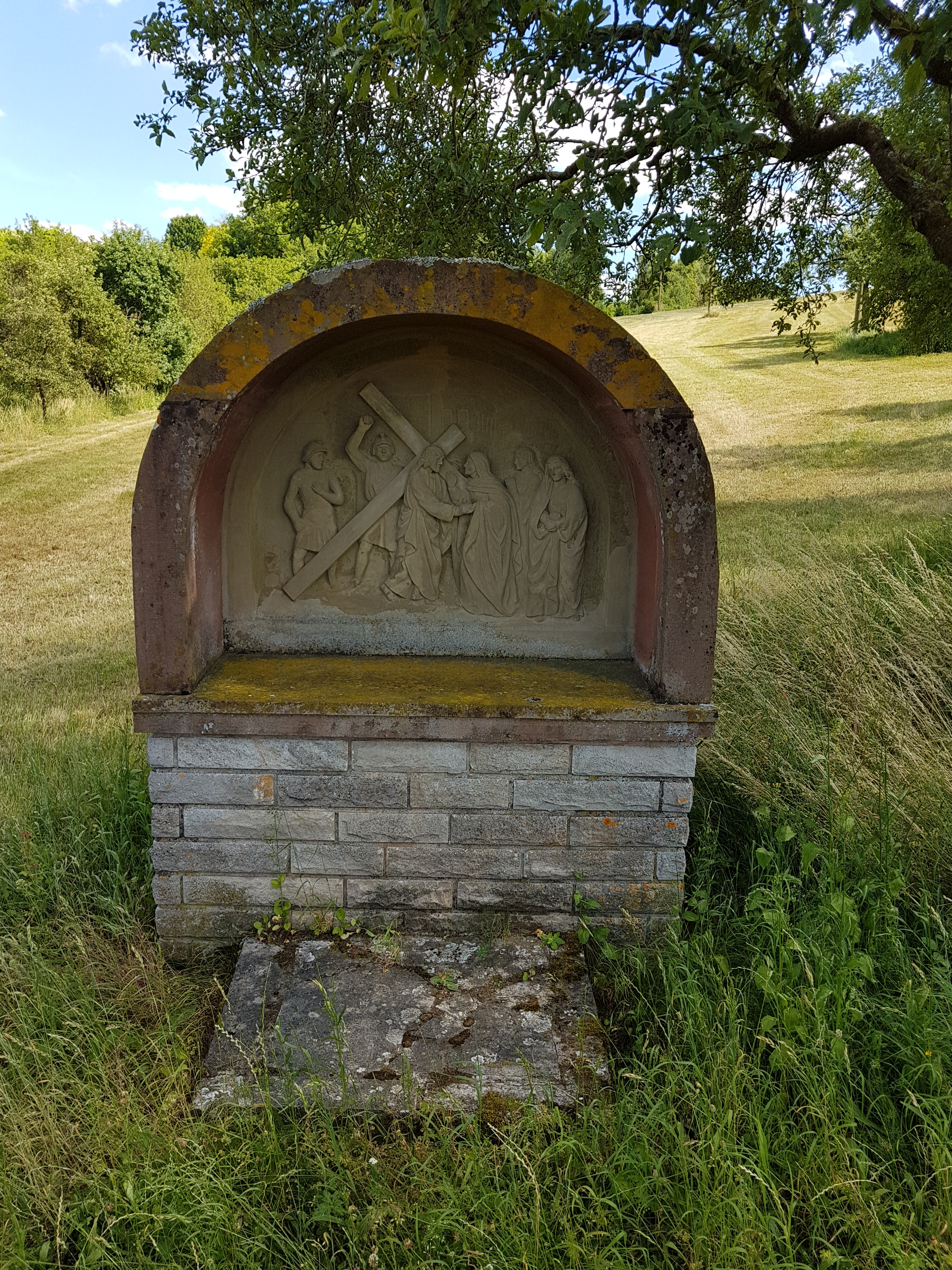 Kreuzweg zur Dittwarer Kreuzkapelle am Kreuzhölzle Bilder hochkant